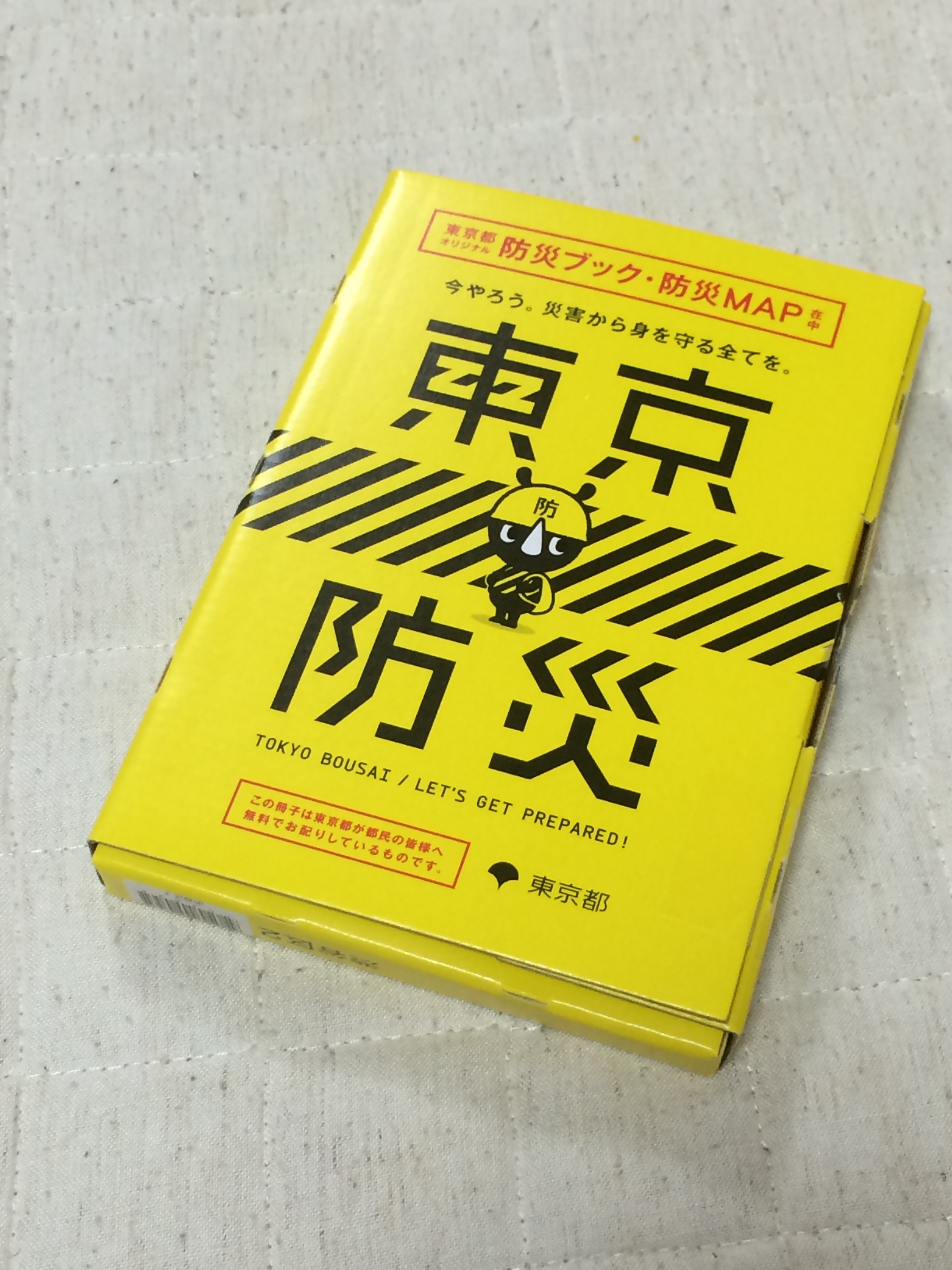 東京都 防災ブック 東京防災 2015